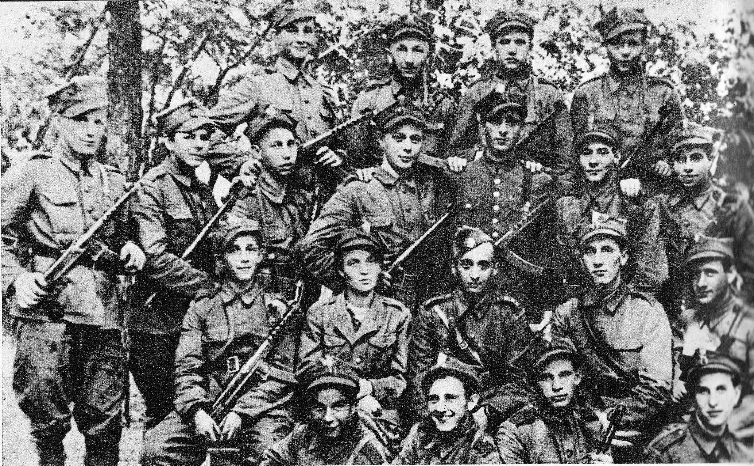 Pluton oddziału specjalnego Armii Ludowej obwodu lubelskiego